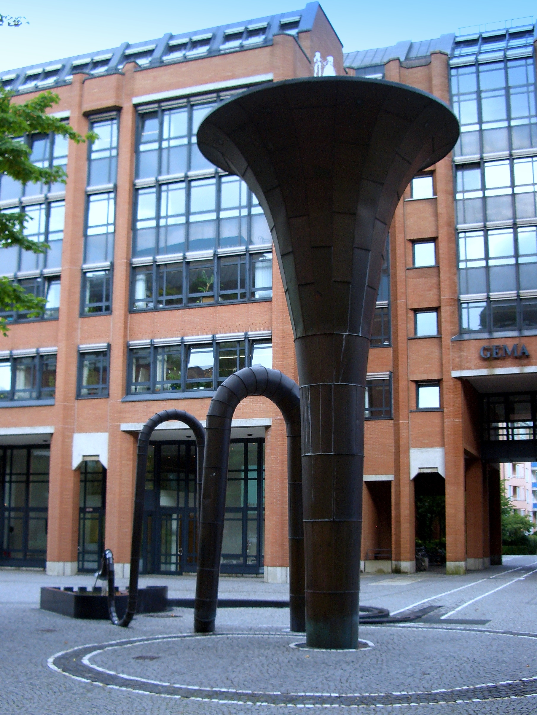 Erich Schulze Brunnen vor dem GEMA Gebäude in München, Künstler: Albert Hien